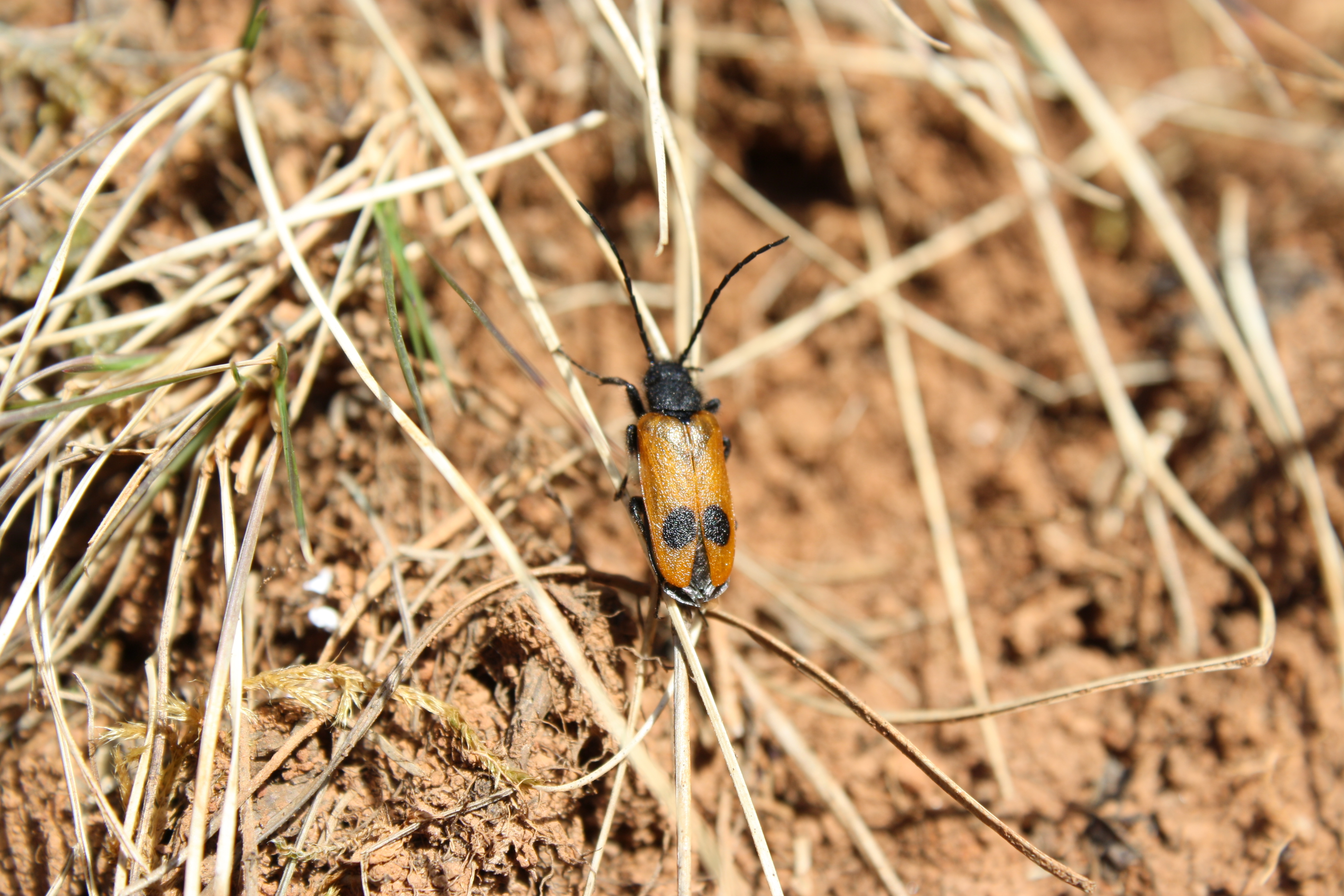 Vzácny meloid